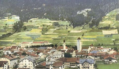 Landesschützekaserne in Innichen